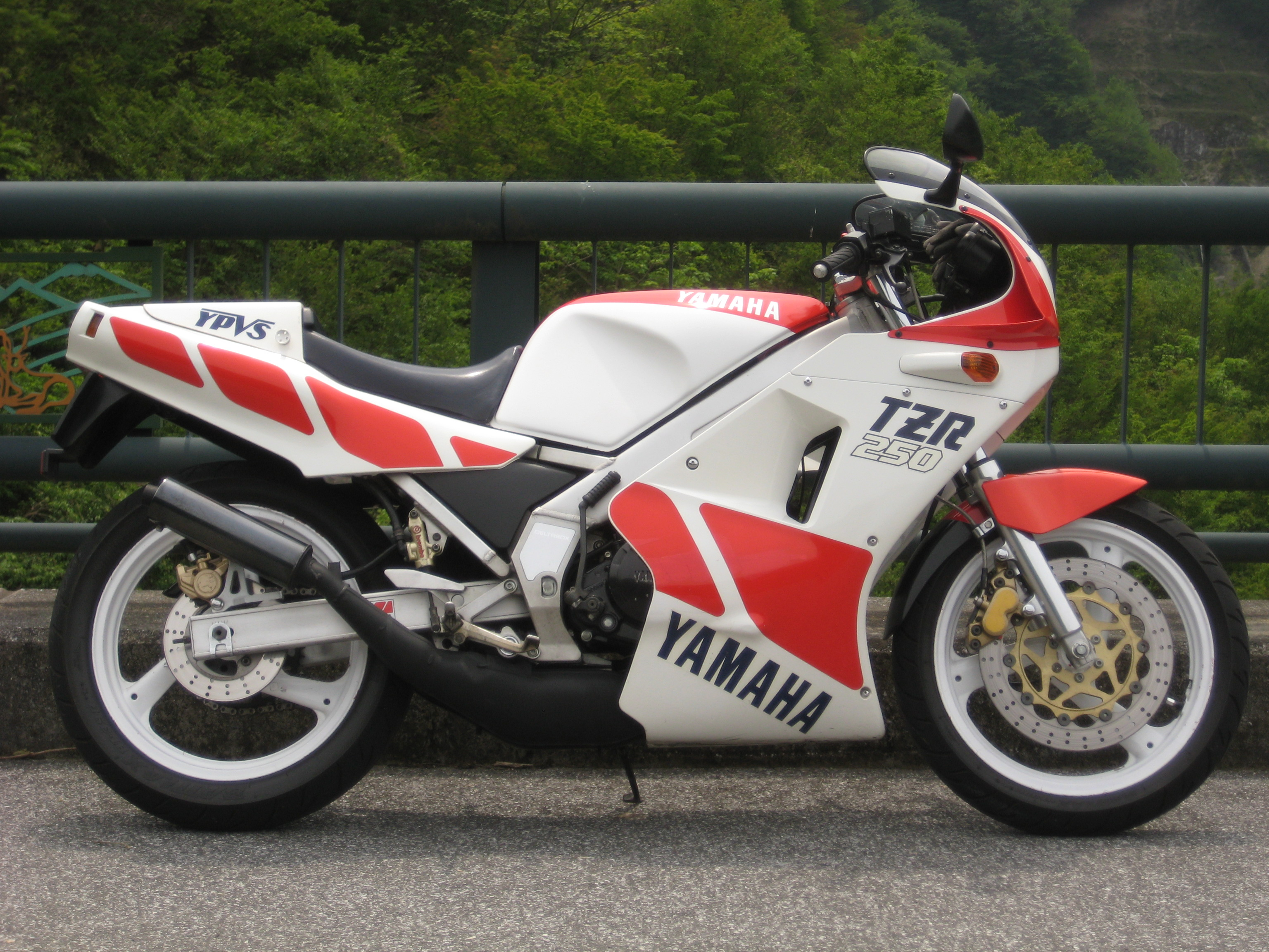 ヤマハTZR250(1KT) '1986年モデル。 YAMAHA TZR250(1KT) '1986 Japan